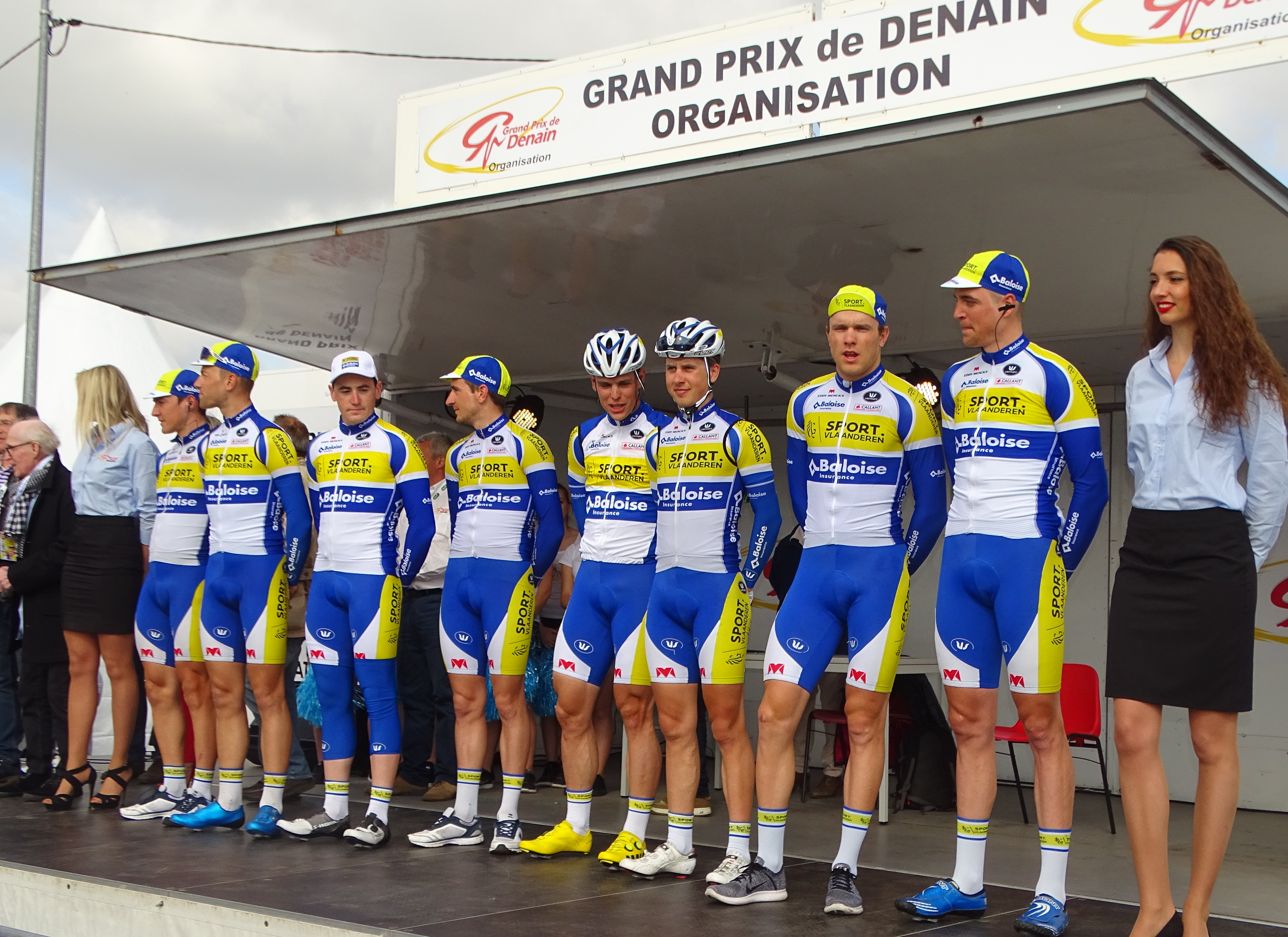 Reportage réalisé le jeudi 13 avril à l'occasion du départ et de l'arrivée du Grand Prix de Denain 2017 à Denain, Nord, Nord-Pas-de-Calais-Picardie, France.